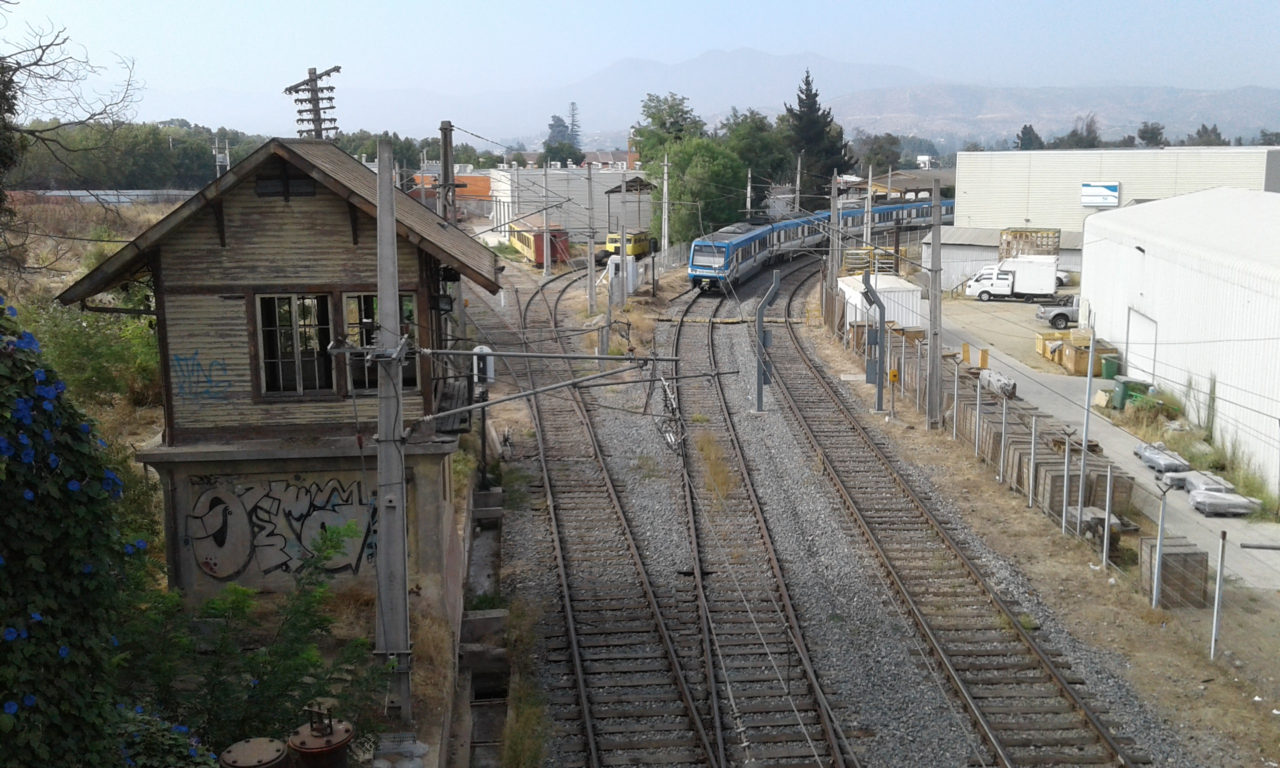 Estación Limache vista desde el antiguo puente de acceso a Los Laureles. Se aprecia una antigua caseta, actualmente en desuso.